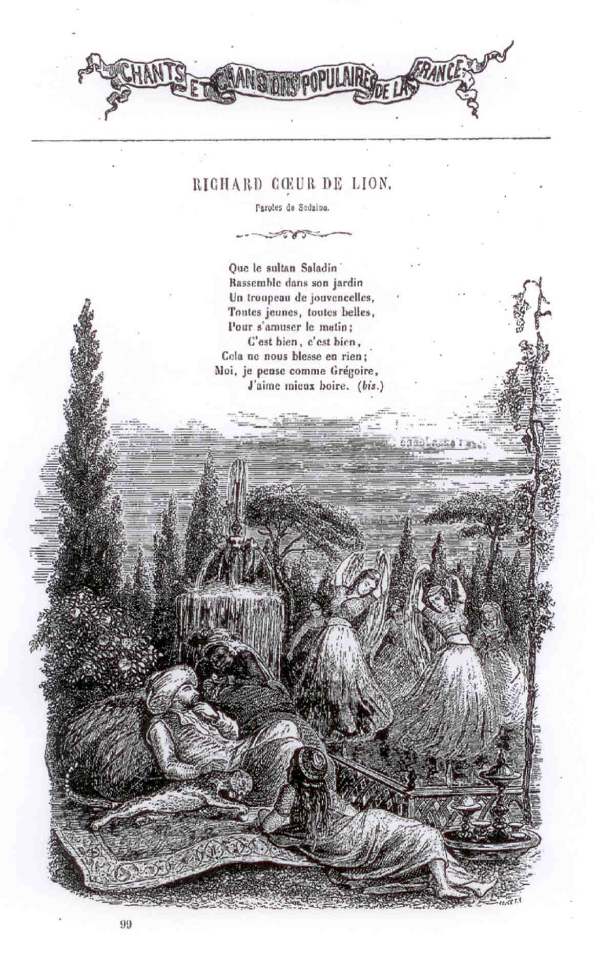 Chanson extraite de l'opéra-comique Richard Cœur-de-Lion de Sedaine, musique de Grétry.